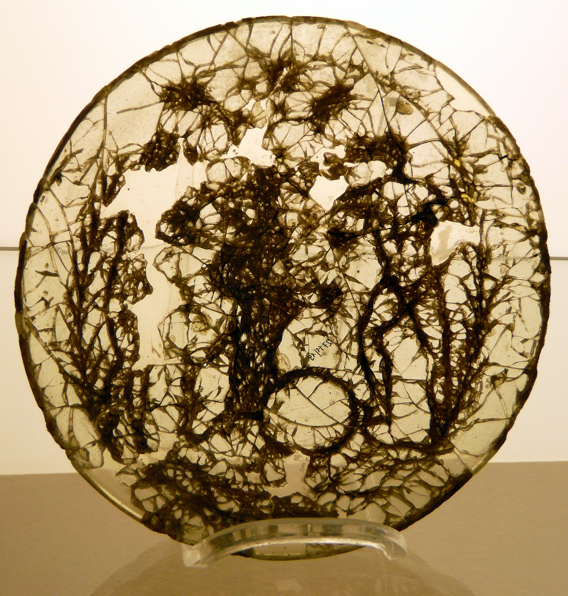 Gelduba: Glasteller (4. Jh.), von hinten eingeritzte Darstellung von Adam & Eva, Museum Burg Linn